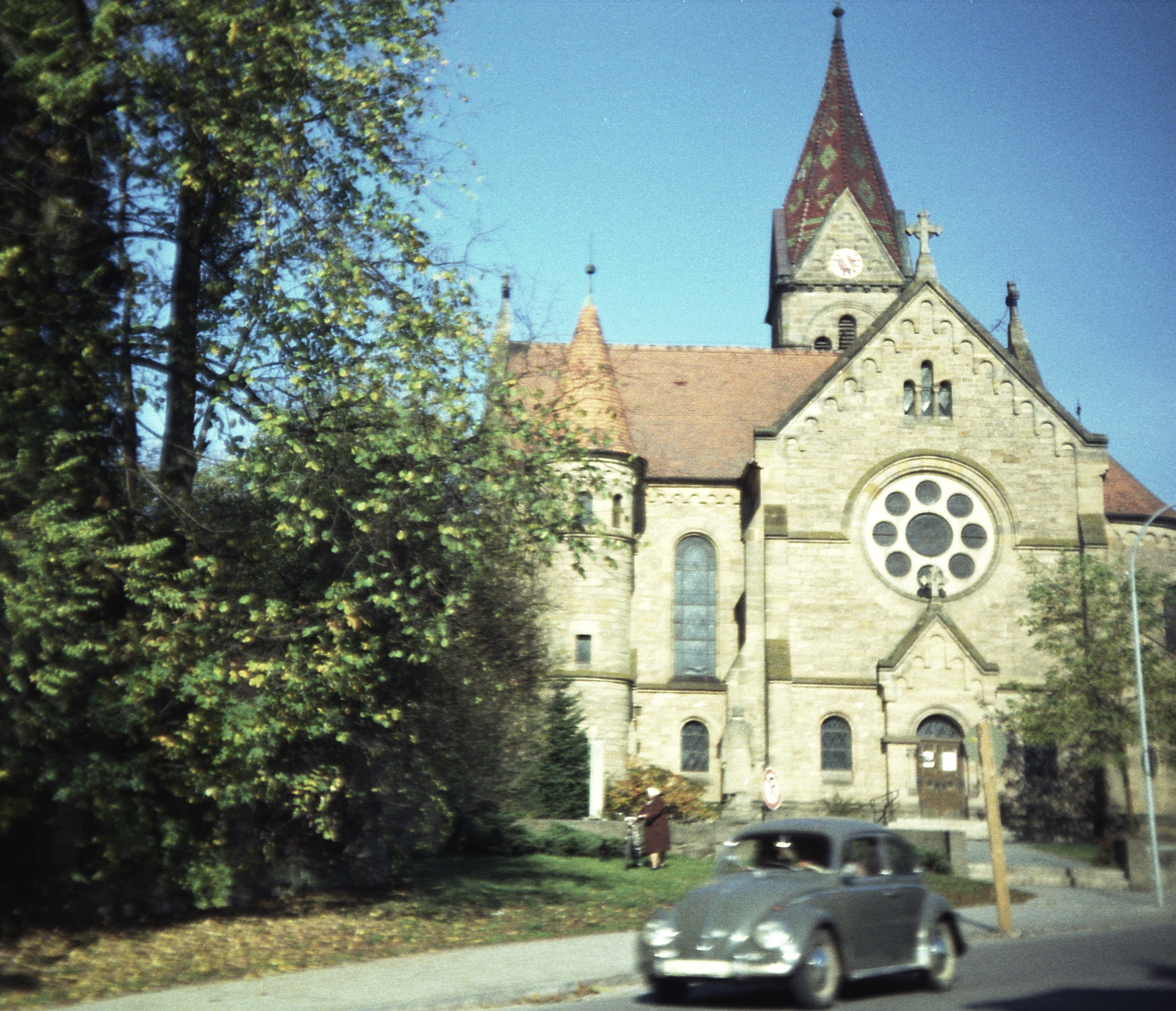 St. Nikolaikirche Neuendettelsau (Südfront)